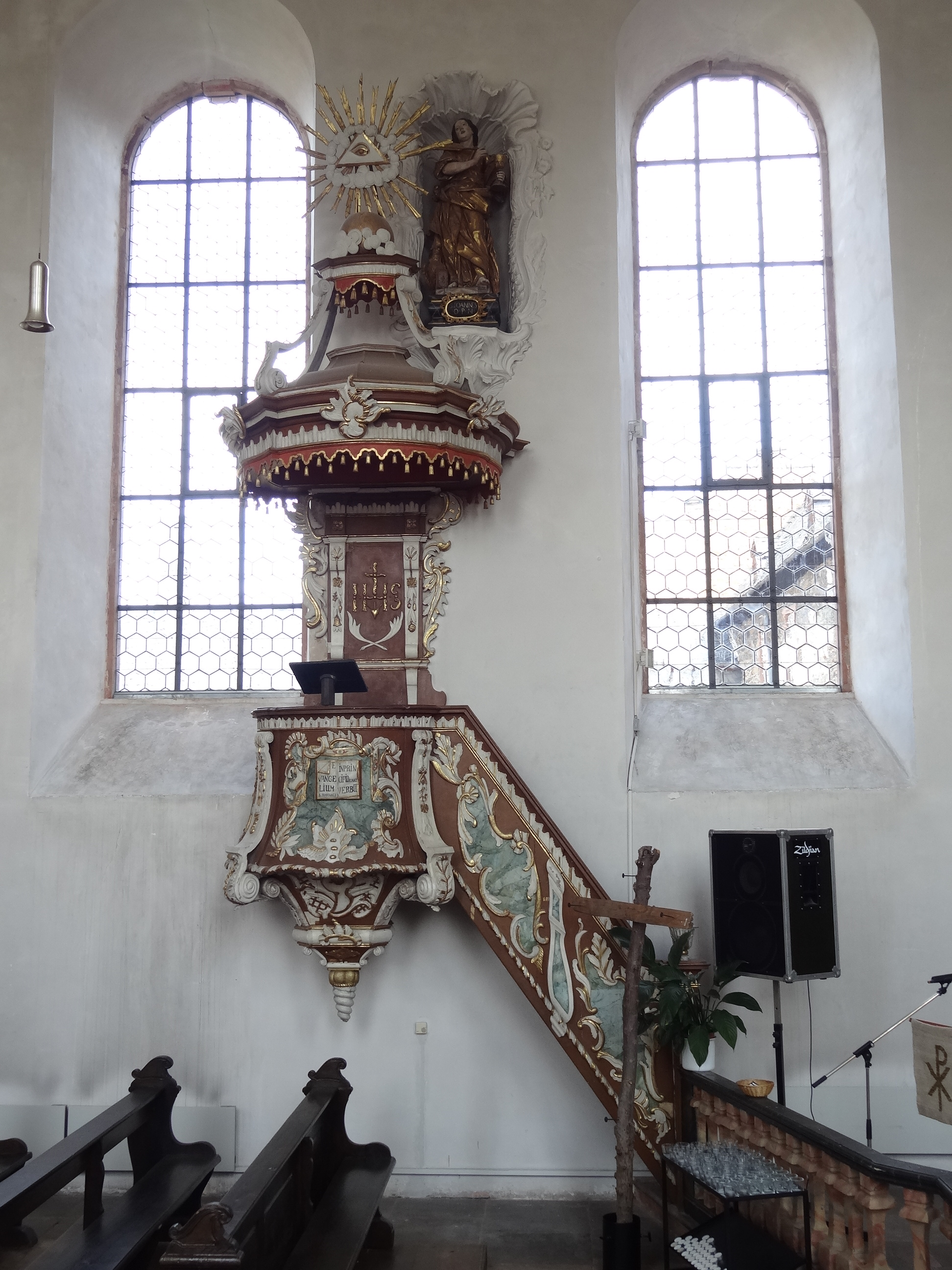 Klosterkirche (JVA Rockenberg)